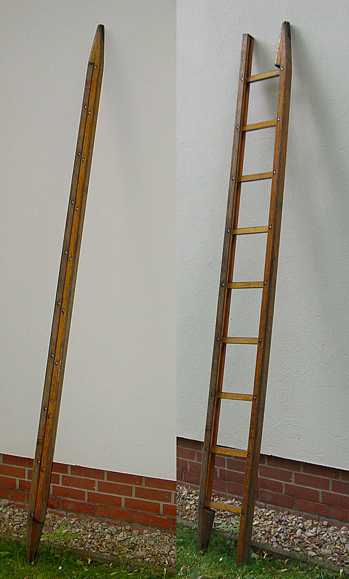 Bild einer Klappleiter